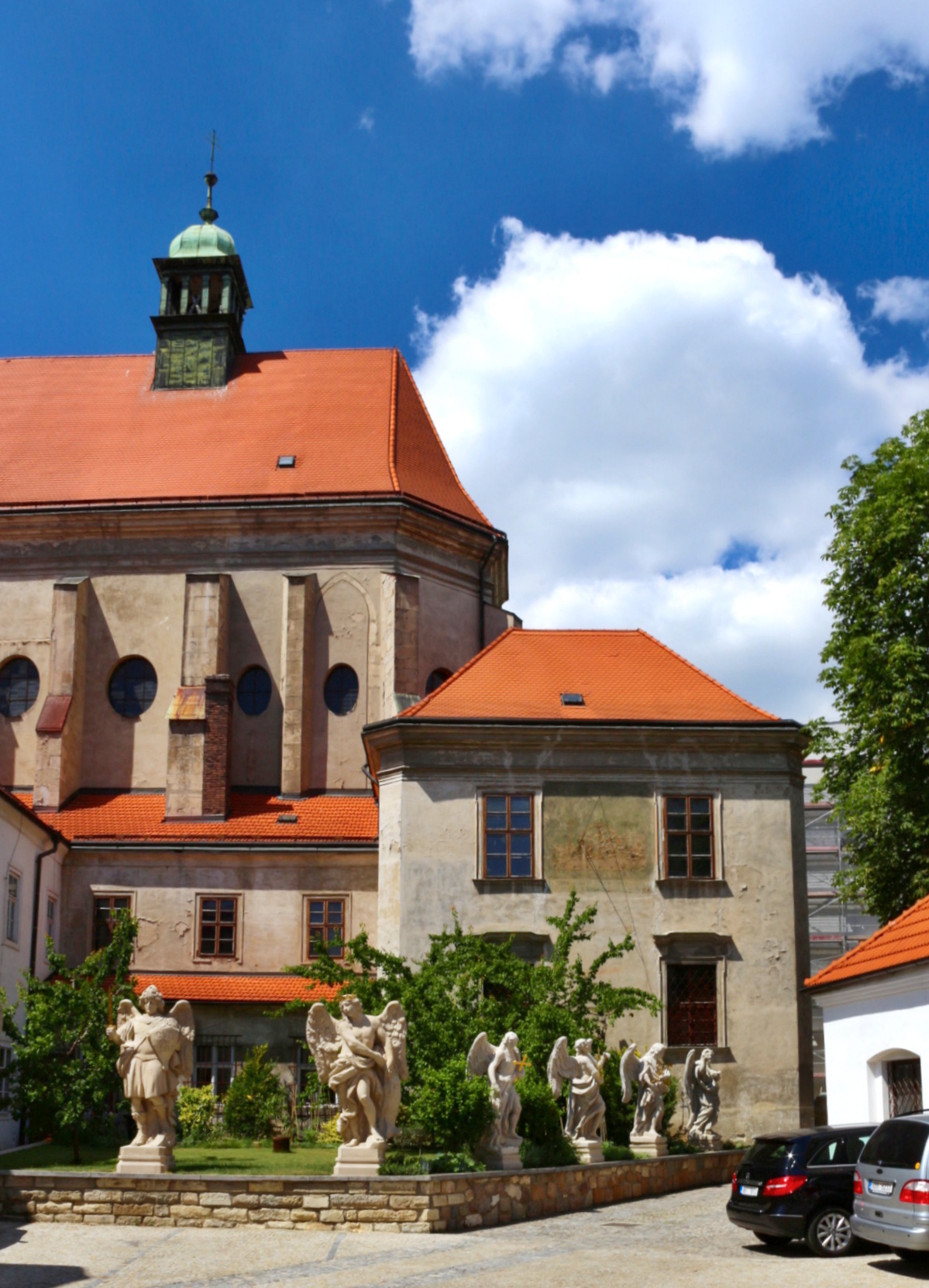 Brno, Orlí ulice - areál kláštera minoritů